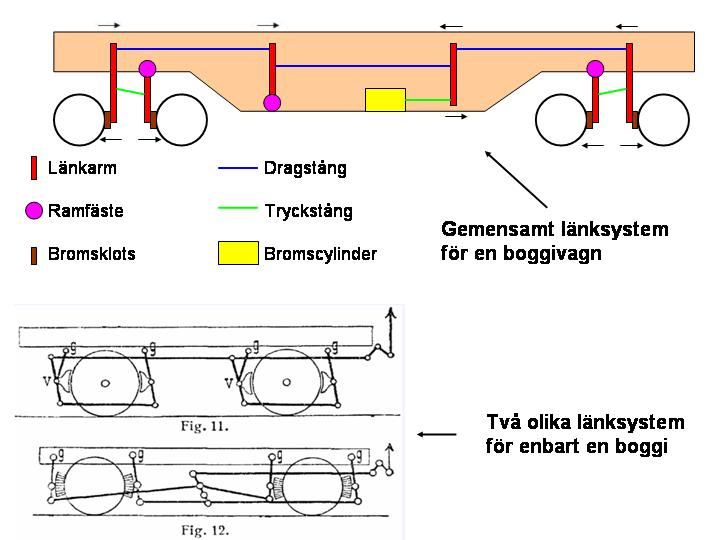 Länksystem